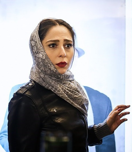 رعنا آزادی‌ور